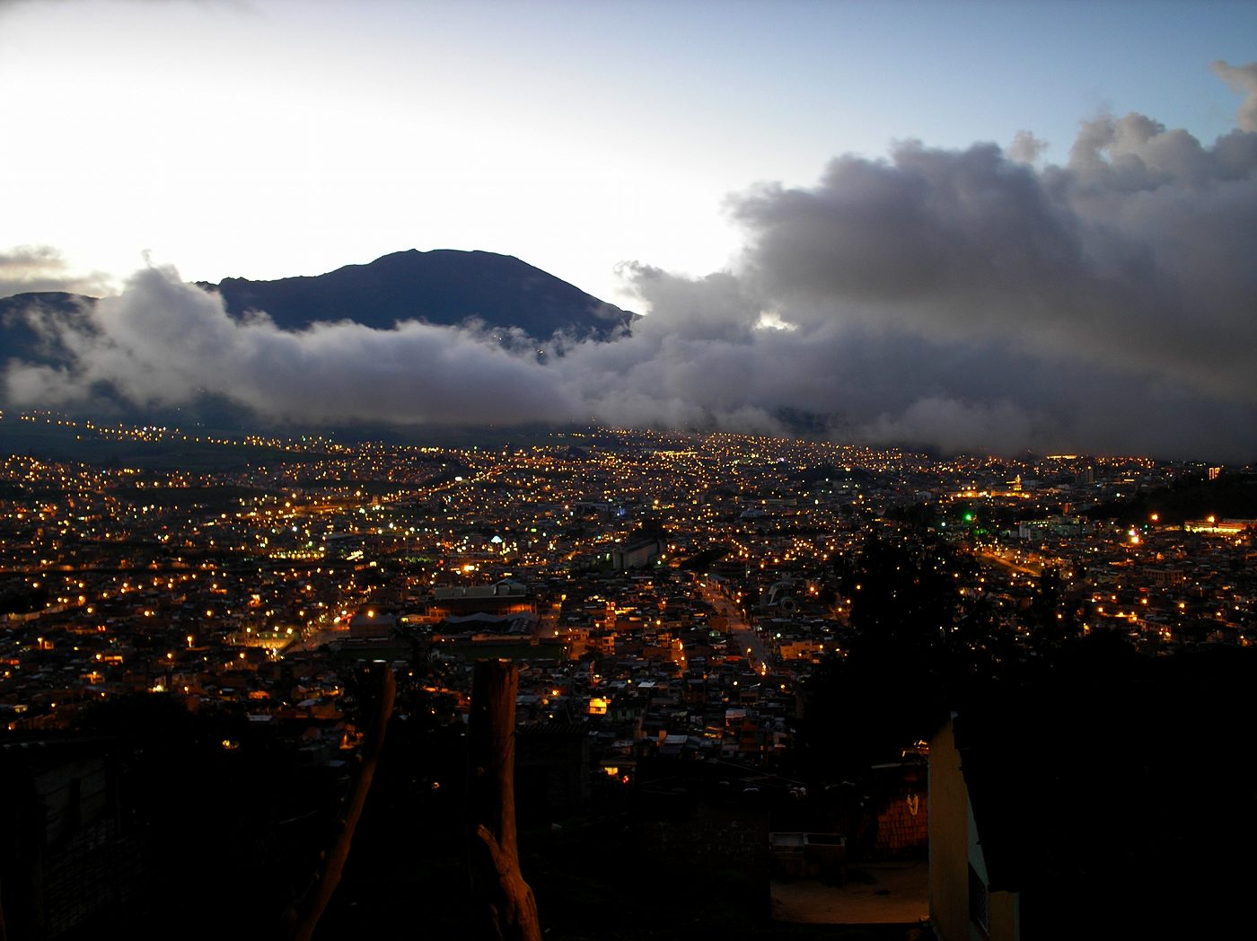 Vista de San Juan de Pasto al atardecer